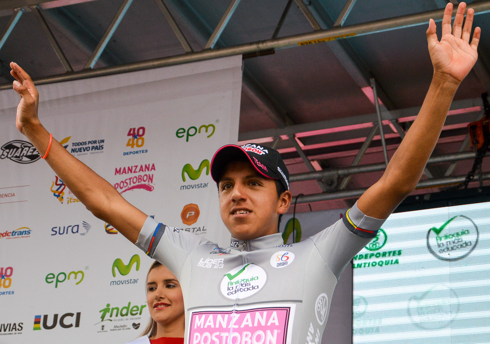 Eta12. Vuelta a Colombia 2015 - Viernes 14 de agosto de 2015. Ituango - Bello (150Kms)